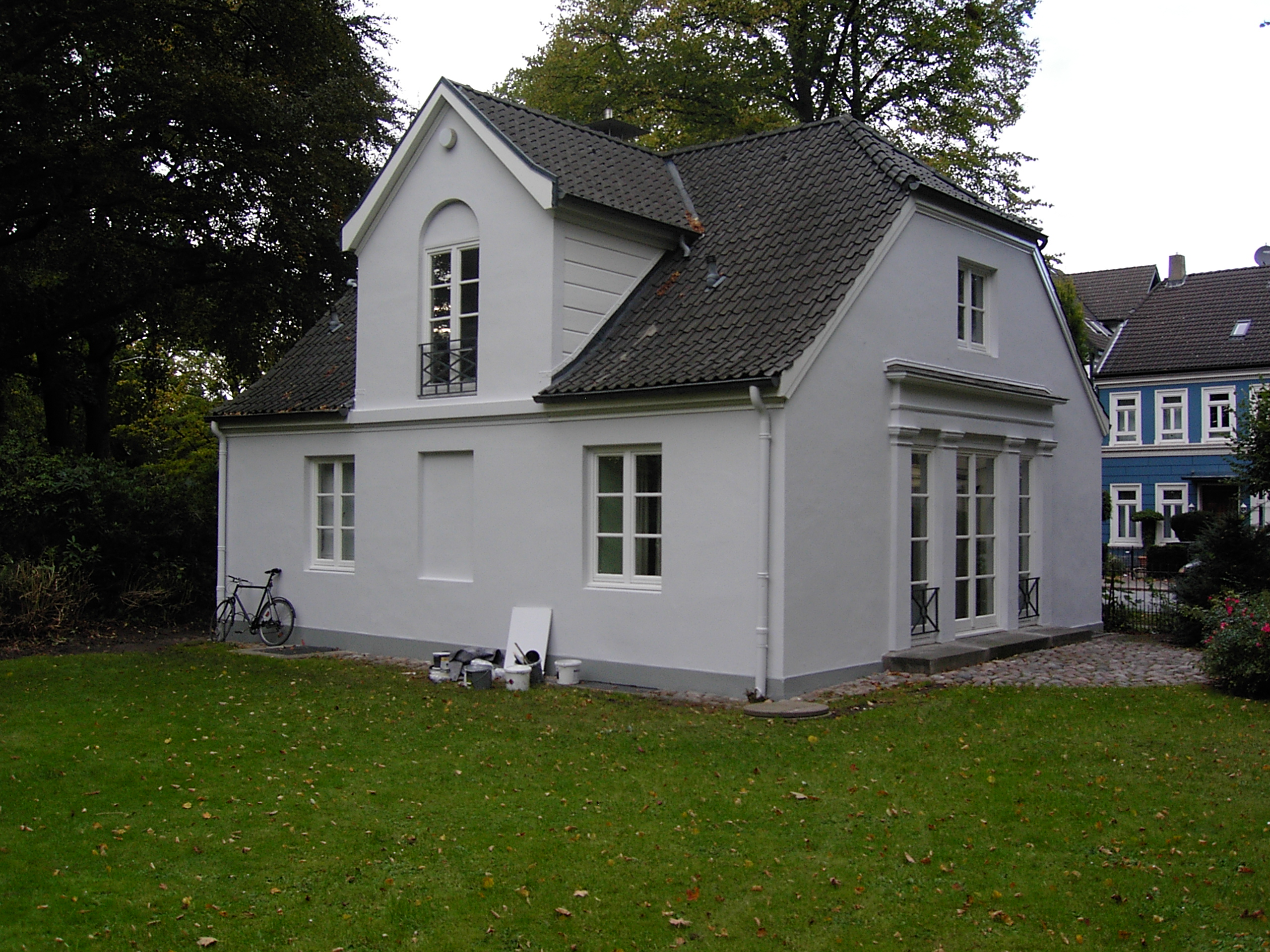 Rückseite des ehemaligen Gartenhauses des Salomon Heine (1767-1844), Onkel und Mäzen von Heinrich Heine. Das Gartenhaus befindet sich in der Hamburger Elbchaussee 31 (Heine-Park). Heine ließ das Gartenhaus 1832 auf seinem Landsitz errichten. Das Landhaus selbst wurde 1880 abgebrochen. Das Gartenhaus ist heute eine Außenstelle des Altonaer Museums. This is a photograph of an architectural monument.